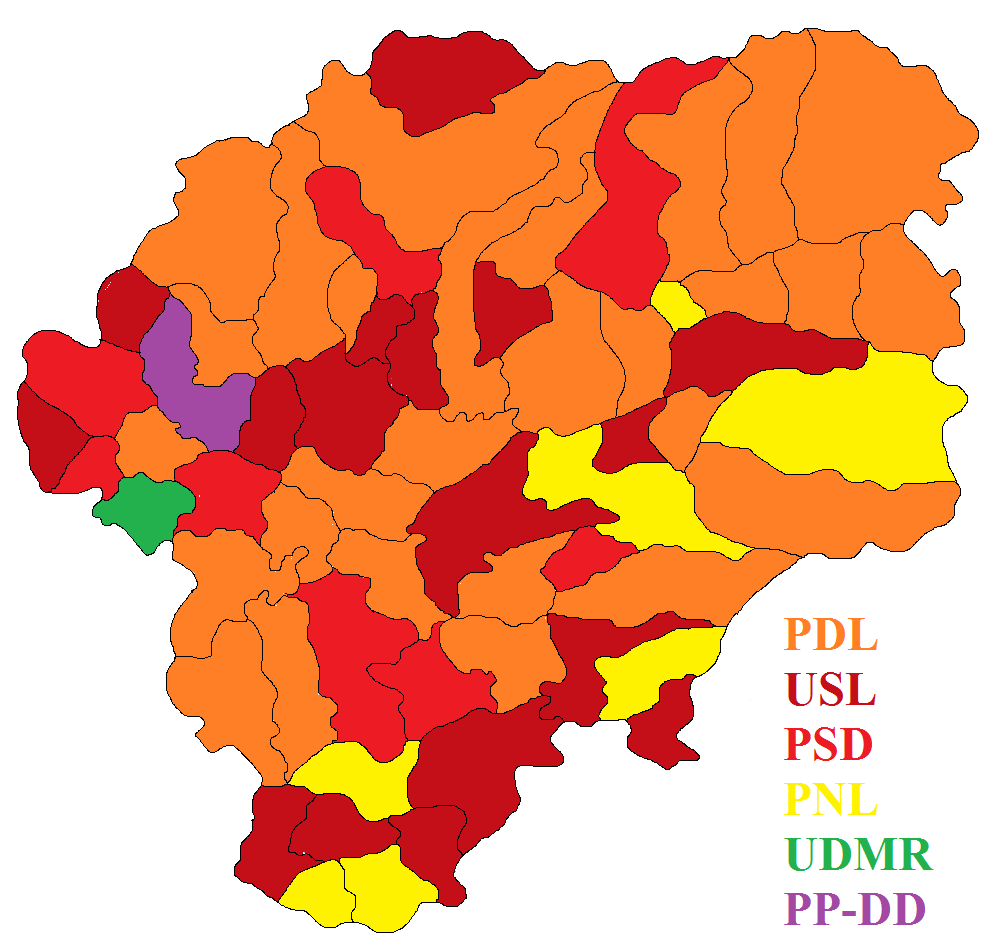 Harta politica a județului Bistrița Năsăud !